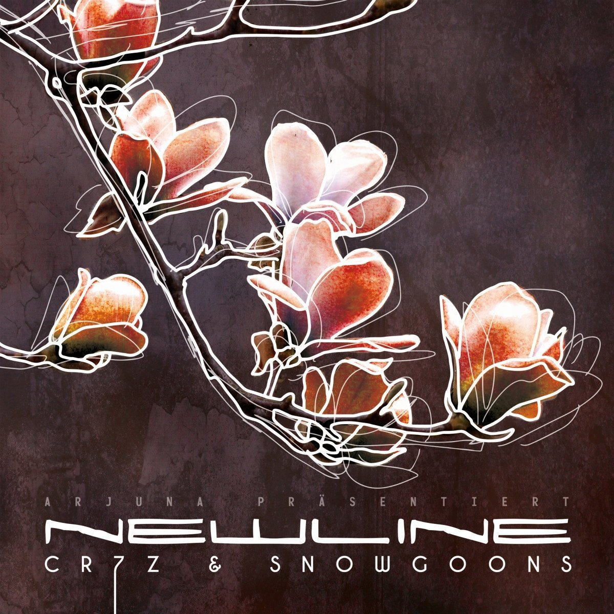 Cover der EP "Newline"